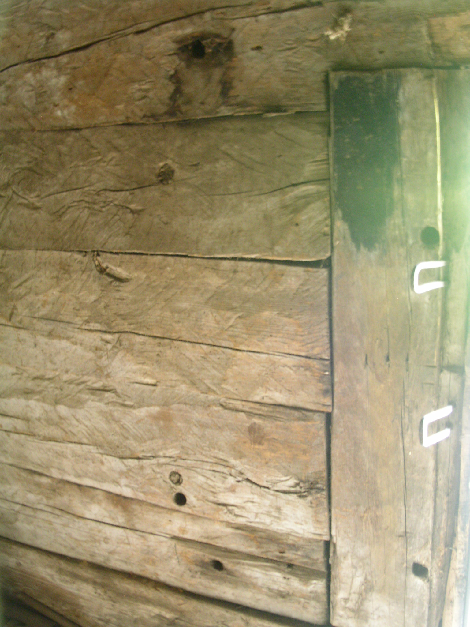 Gåt och stockvarv i Kyrkboden i Ingatorp. Boden är daterad till 1229 (+/-10 år). För närvarande Sveriges äldsta daterade profana byggnad